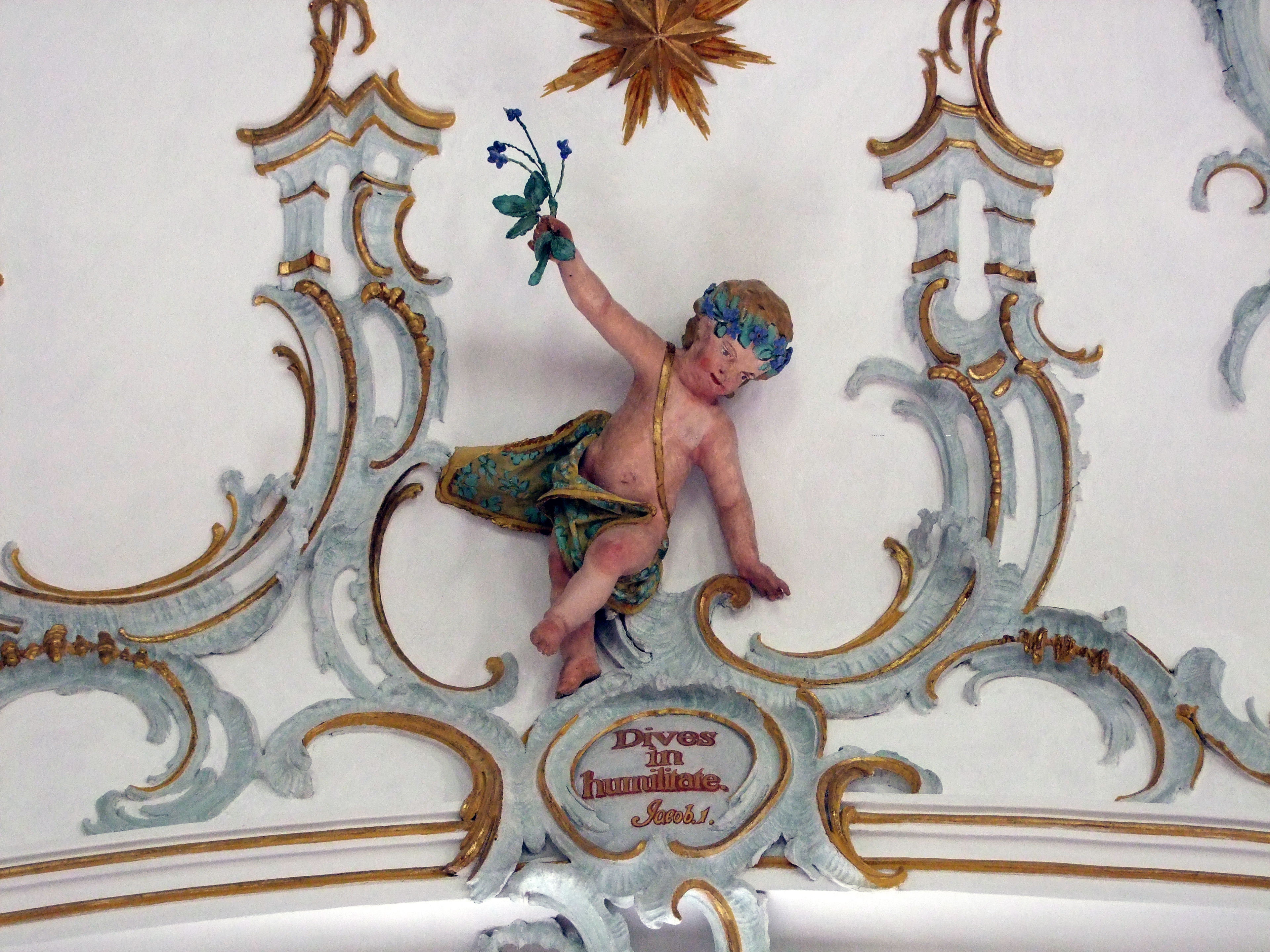 Wallfahrtskirche "Unserer lieben Frau vom Berge Karmel" im oberschwäbischen Mussenhausen, Gemeindeteil Markt Rettenbachs bei Memmingen. Stuckputto an der Decke der Kirche